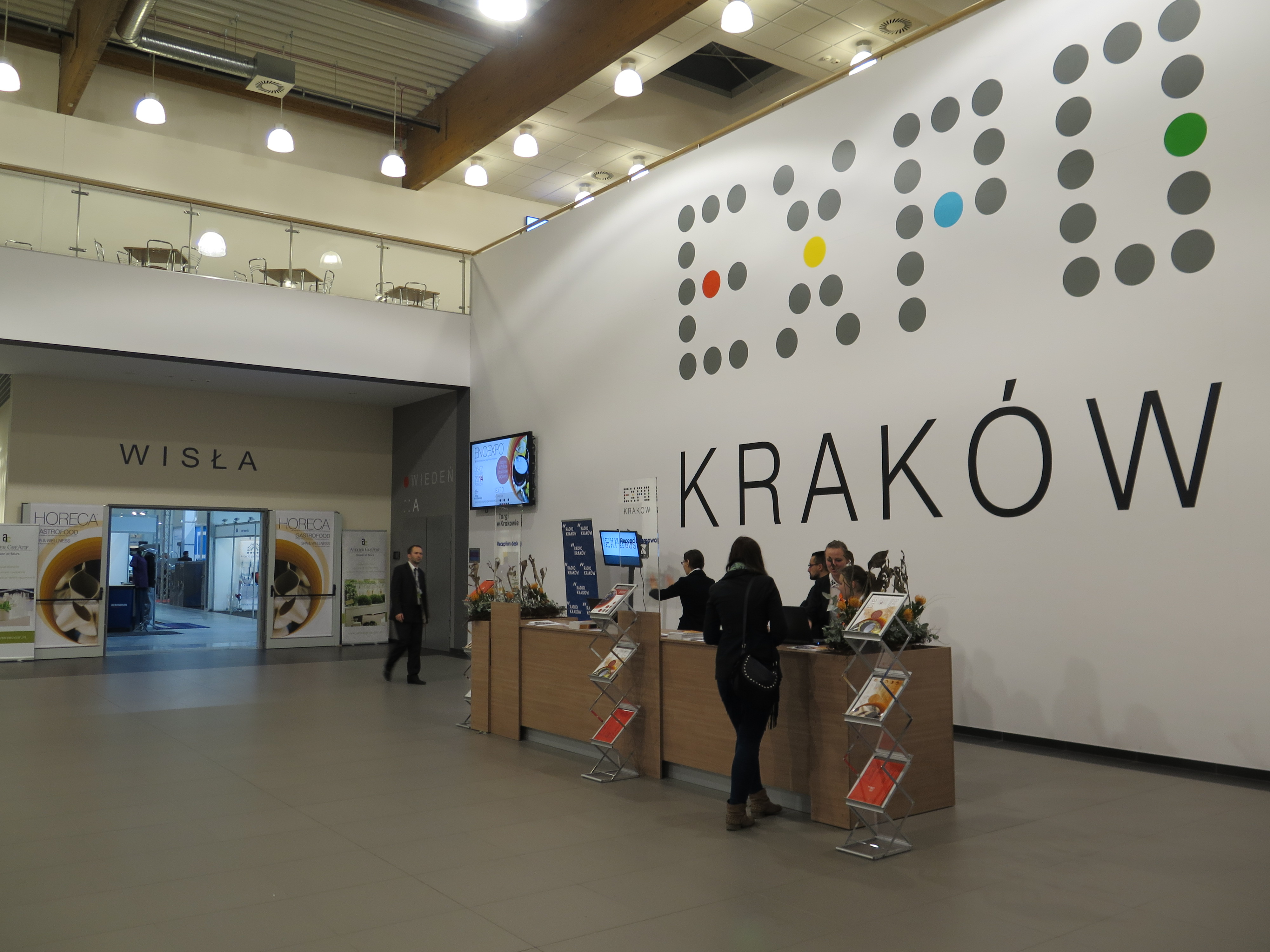 Wejście na targi HORECA 2014 w Krakowie